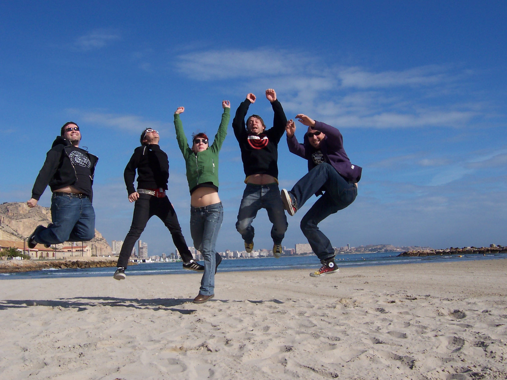 Mallory Knox en Alicante depués de un concierto